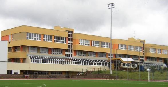 Budova střední školy